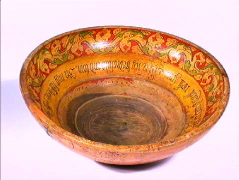 Ølbolle fra Gudbrandsdalen datert 1605. Trolig byarbeid.